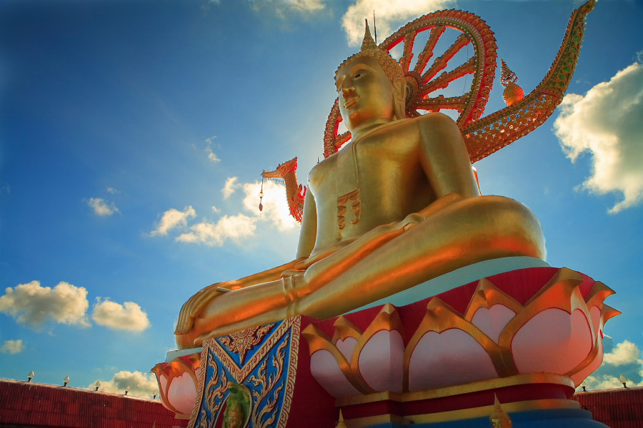 Пляж Биг Будда